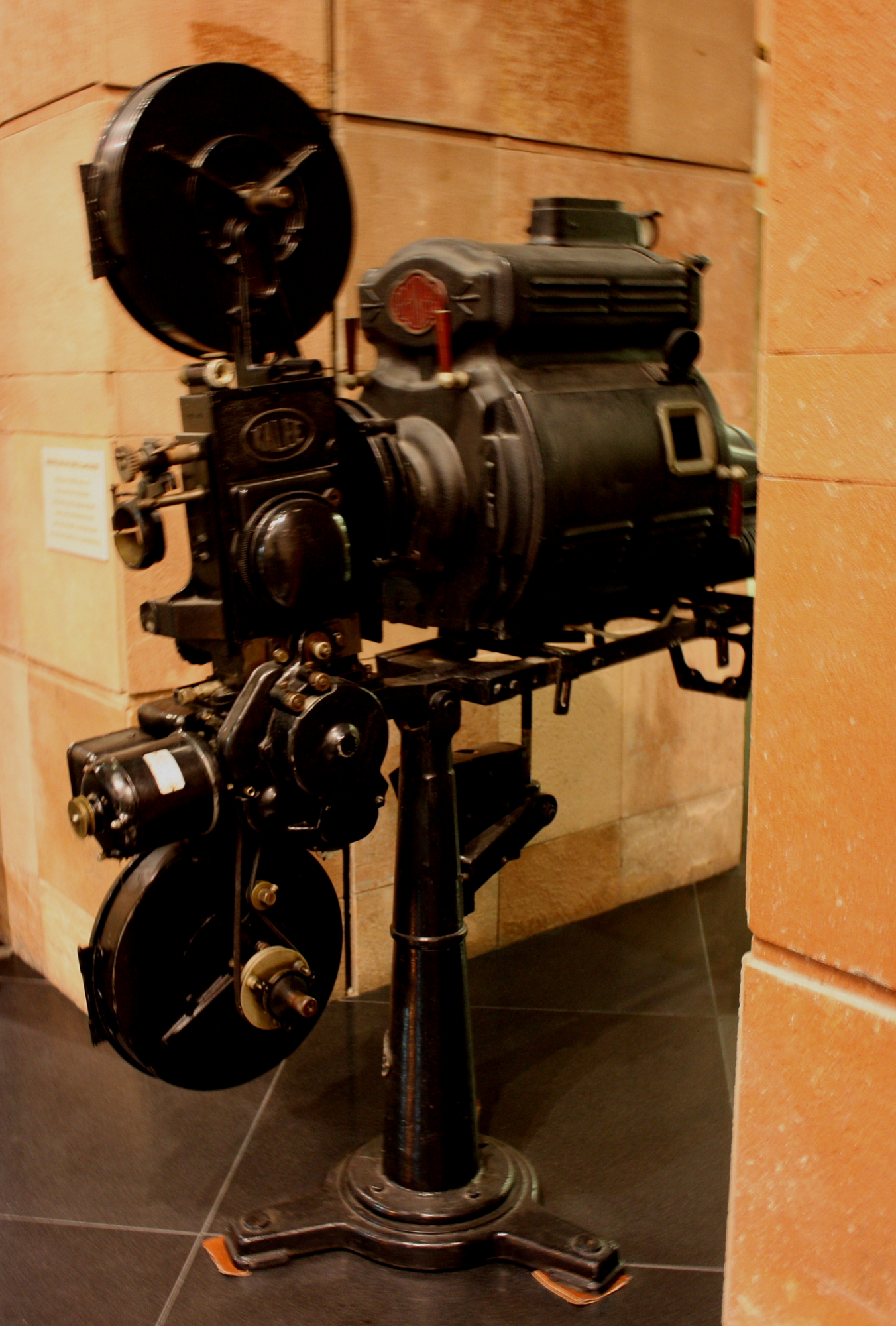 Proyector de cine 35 mm Kalee. Utilizado desde 1944 a 1971 en el Estudio Auditorio para las funciones de Cine Arte del Sodre y los festivales de cine documental y experimental.